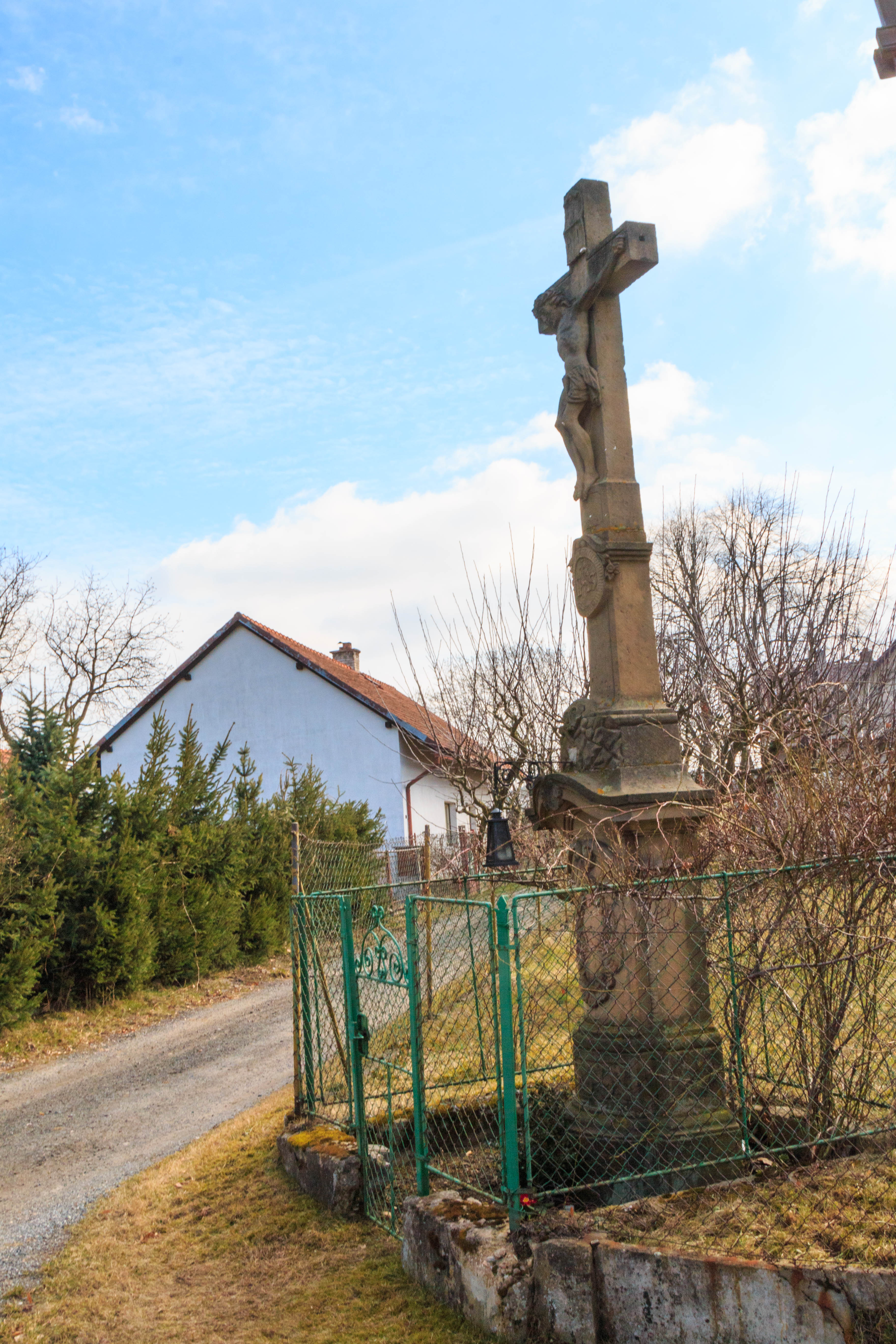 Koryta u Kostelce nad Orlicí - kříž